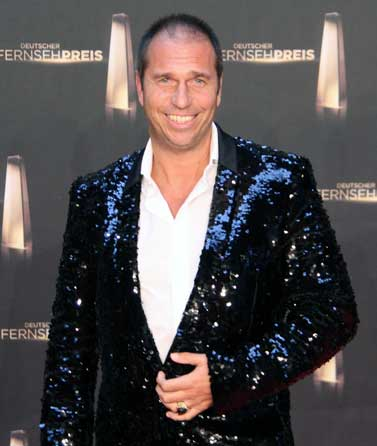 Kai Ebel beim Deutschen Fernsehpreis 2012